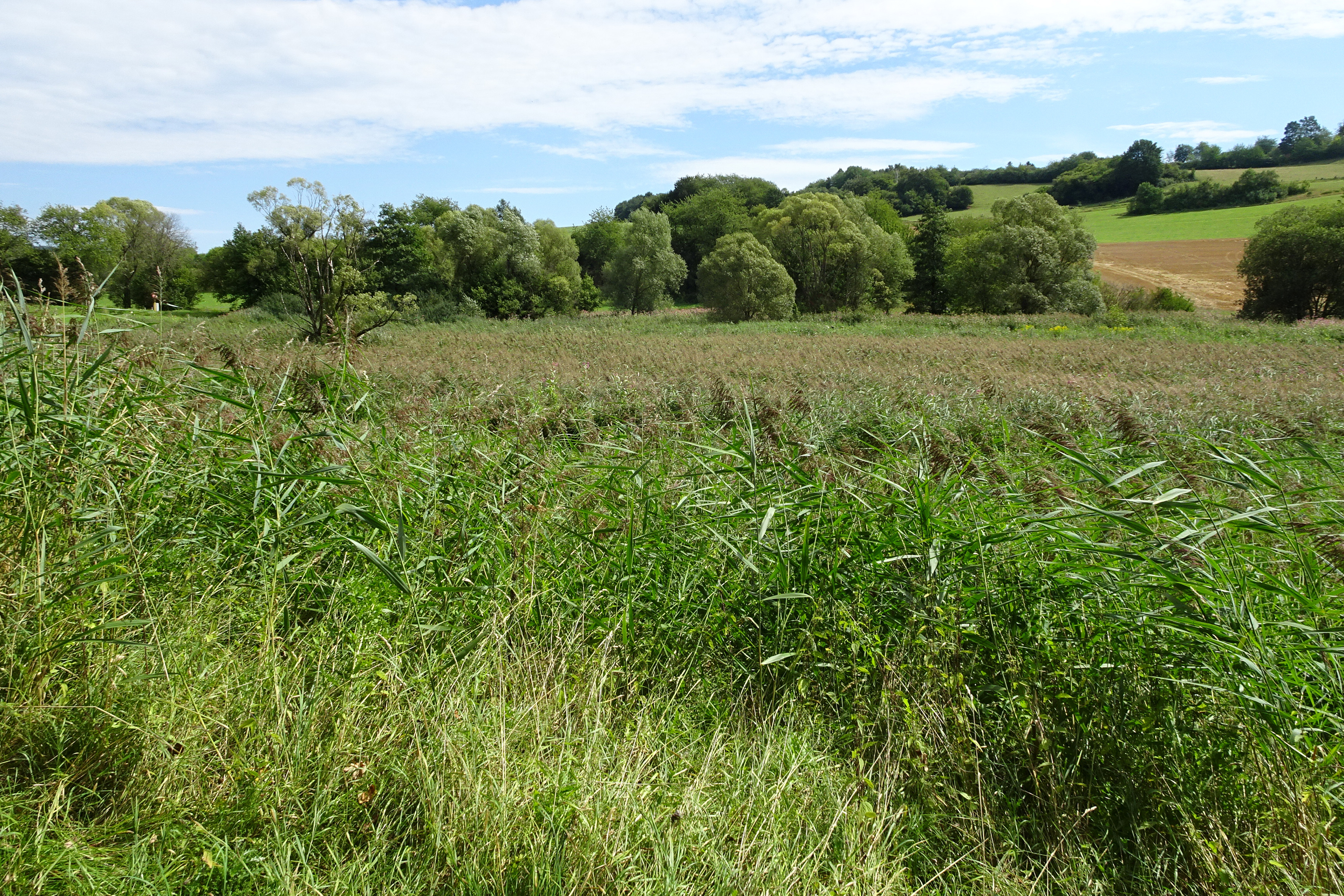 „Auf dem Ried bei Iba“ ist ein Feuchtgebiet in der Talaue eines kleinen Baches südwestlich des Bebraer Stadtteils Iba im hessischen Landkreis Hersfeld-Rotenburg.. Es besteht aus Ried- und Streuwiesen, die infolge der hydrologischen Verhältnisse nicht mehr landwirtschaftlich bearbeitet werden. Die feuchten und nassen Wiesen sind nach der Nutzungsaufgabe zum Lebensraum zahlreicher gefährdeter Tier- und Pflanzenarten geworden. Um ihre Habitate dauerhaft zu sichern und durch Pflegemaßnahmen zu verbessern, wurde der Bereich Ende des Jahres 1985 zum Naturschutzgebiet erklärt. Das „Ried“ ist eines der wenigen Bachschutzgebiete der Region, in dem großflächig Quellwasser dem Bachlauf zufließt.